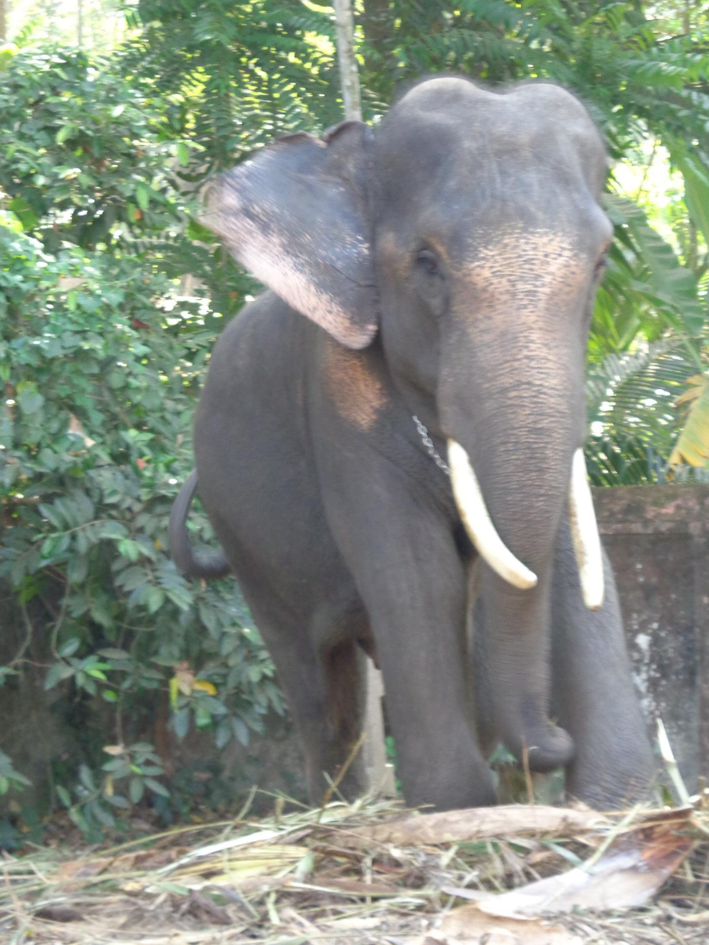 the temple elephent of evoor- kannan